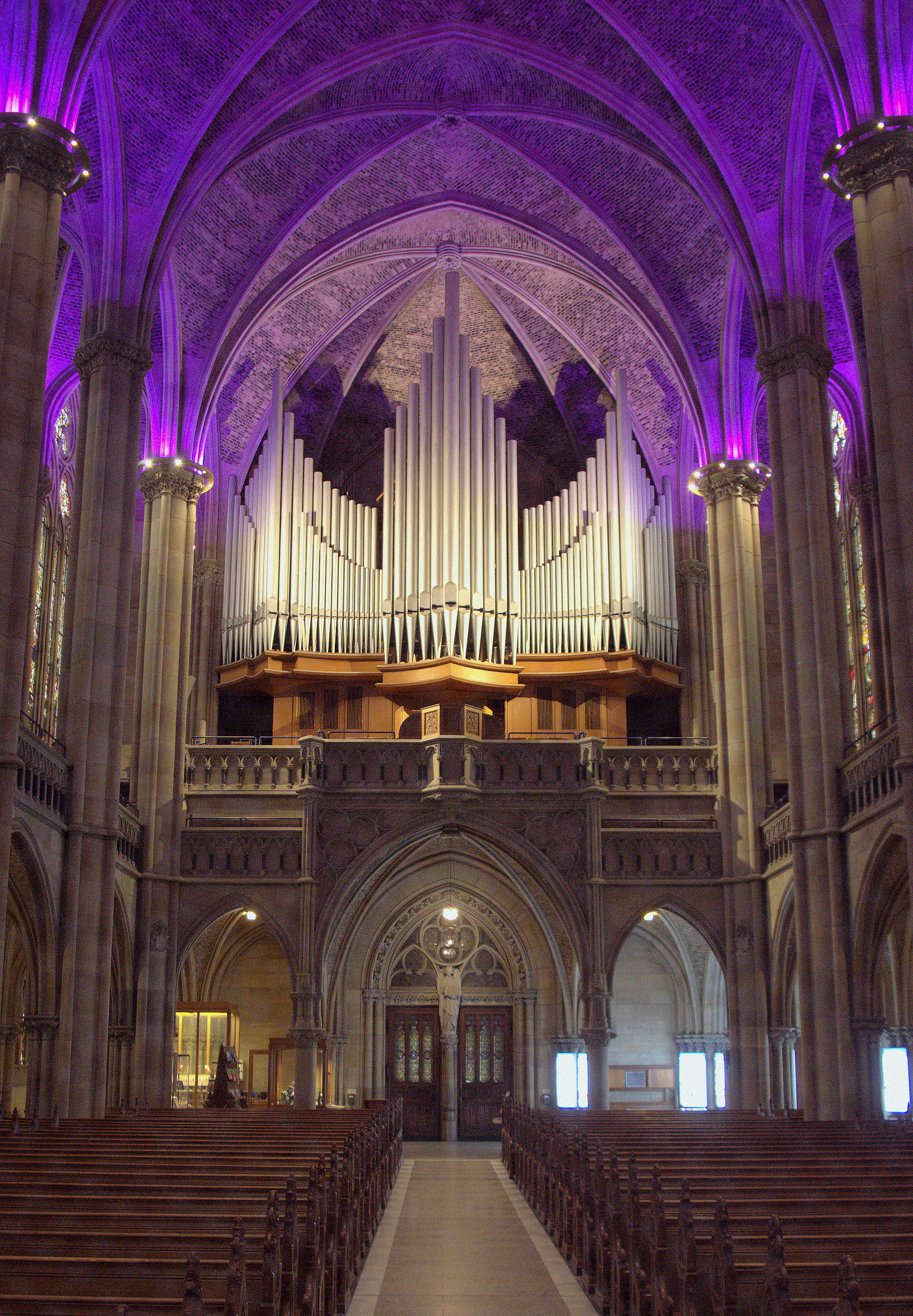 Gedächtniskirche fan Spiers, oargel